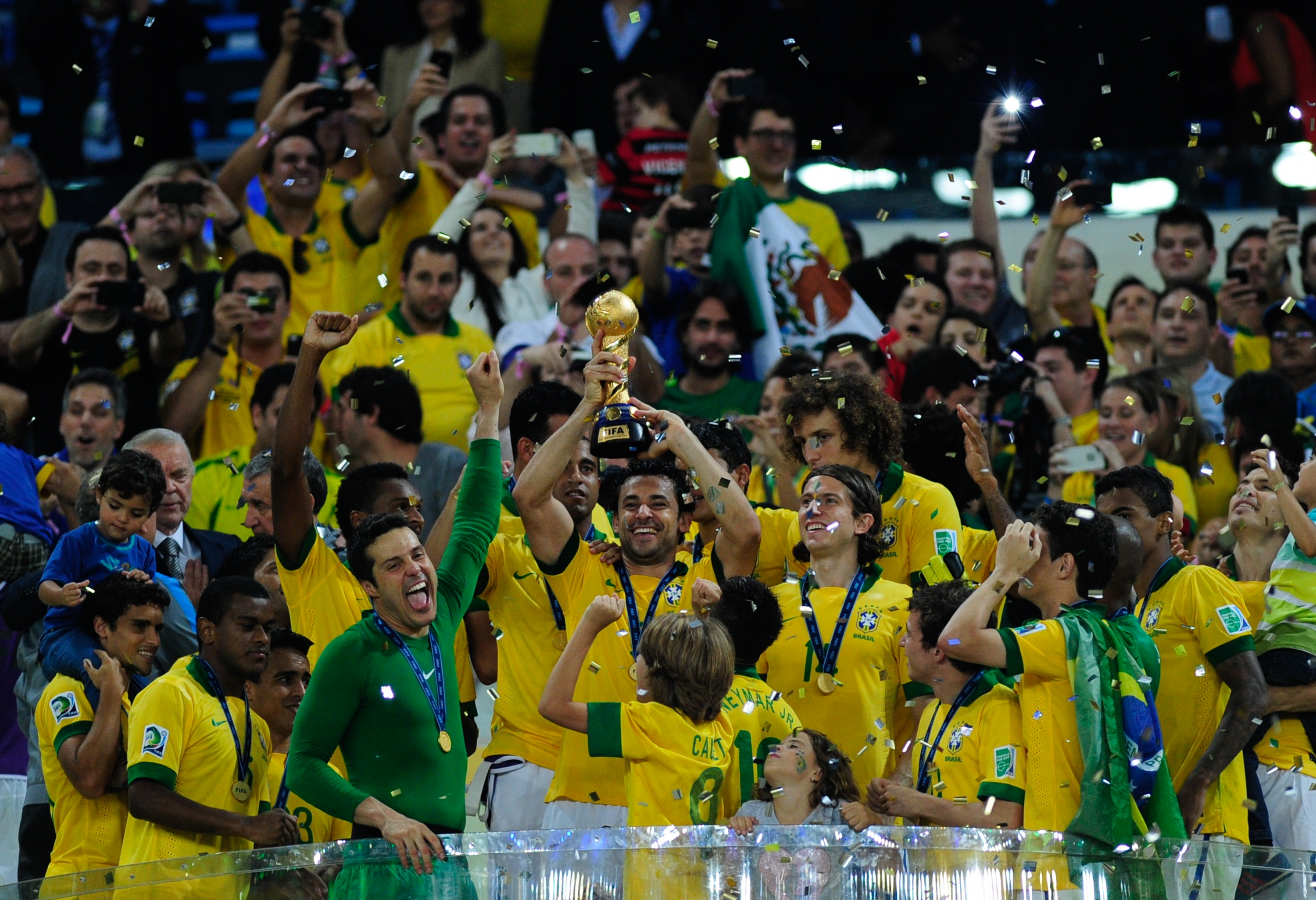 Festa da Seleção Brasileira no podium, recebendo a taça da Copa das Confederações de 2013.